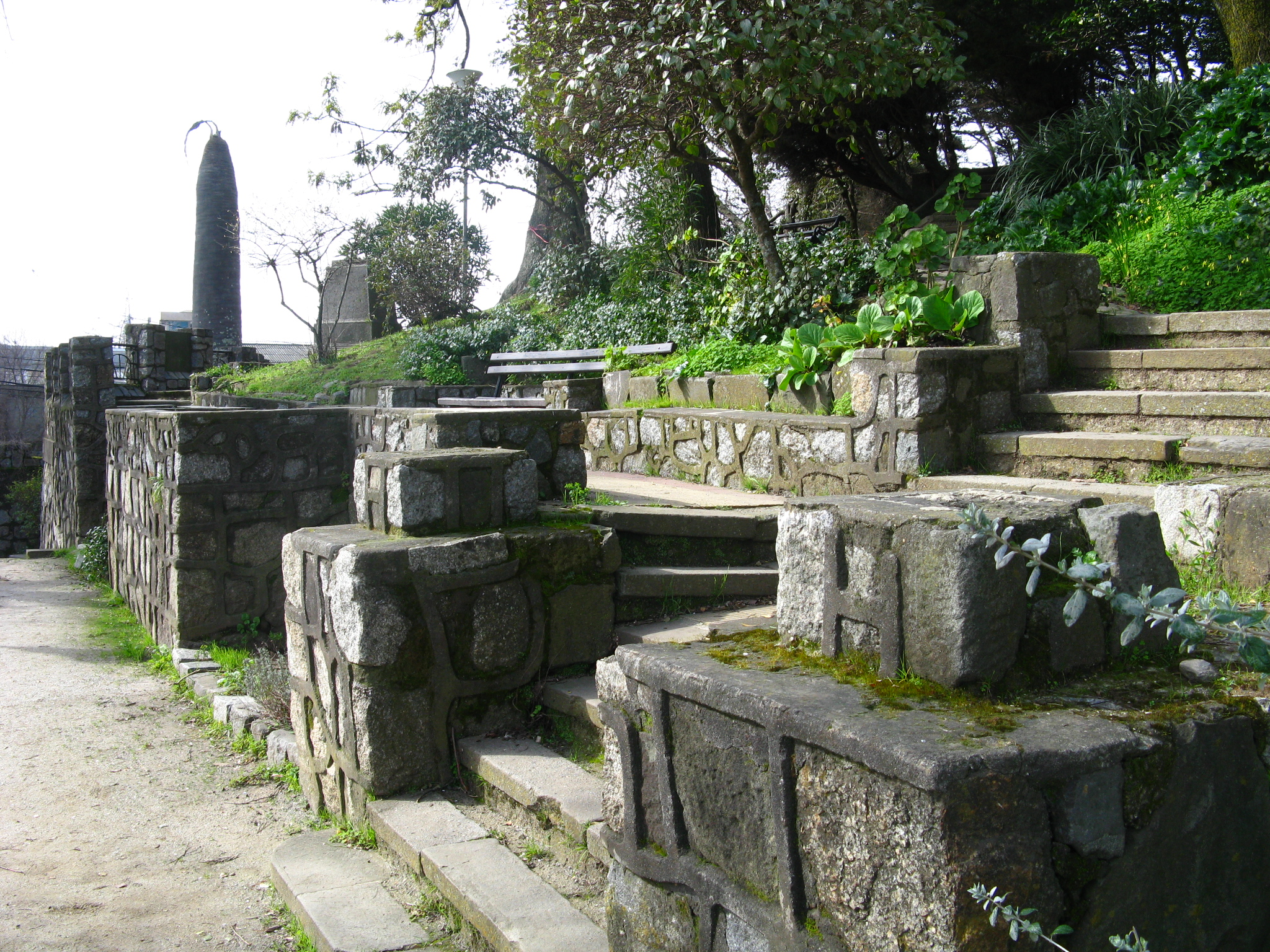 Cerro Amarillo Concepción, Chile Agosto de 2012